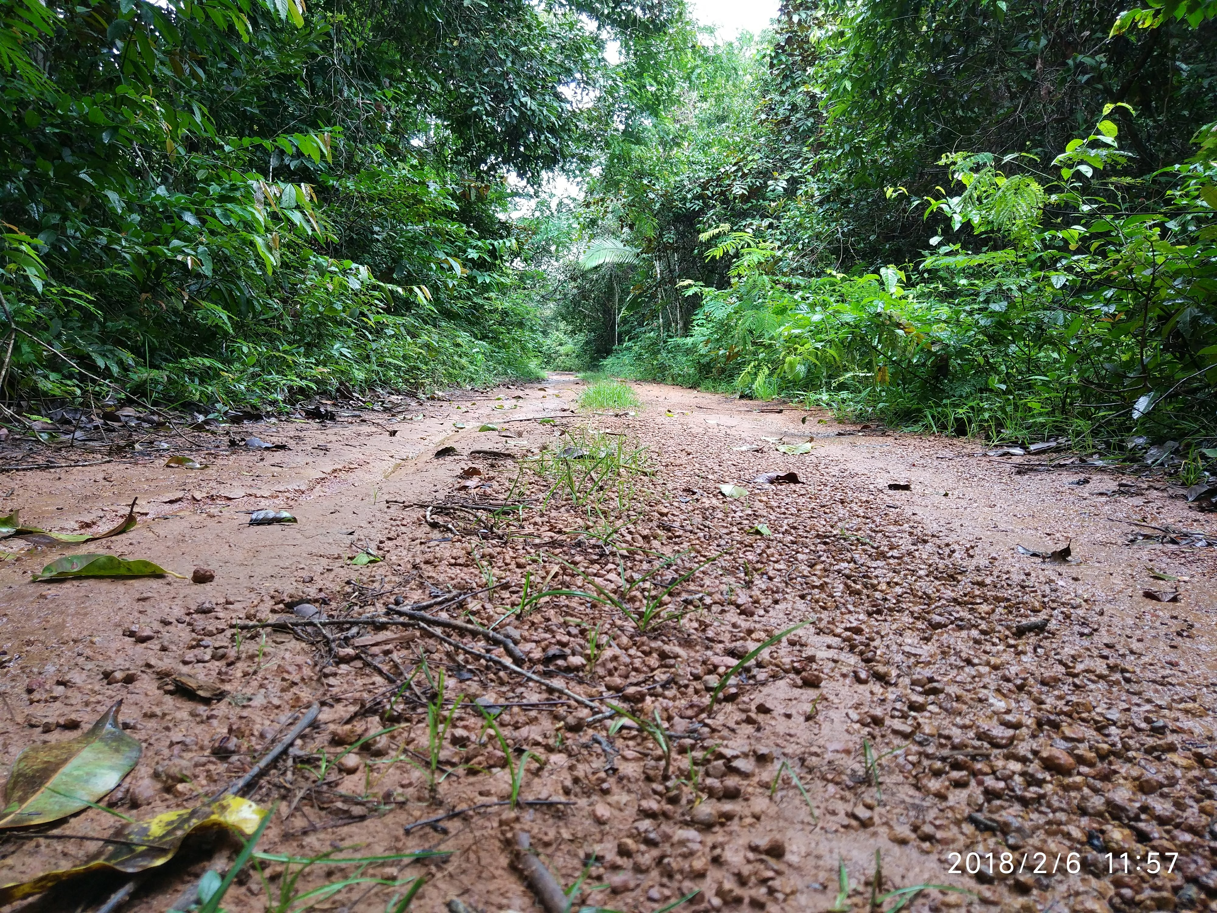 Estrada próxima a mina Santa Maria